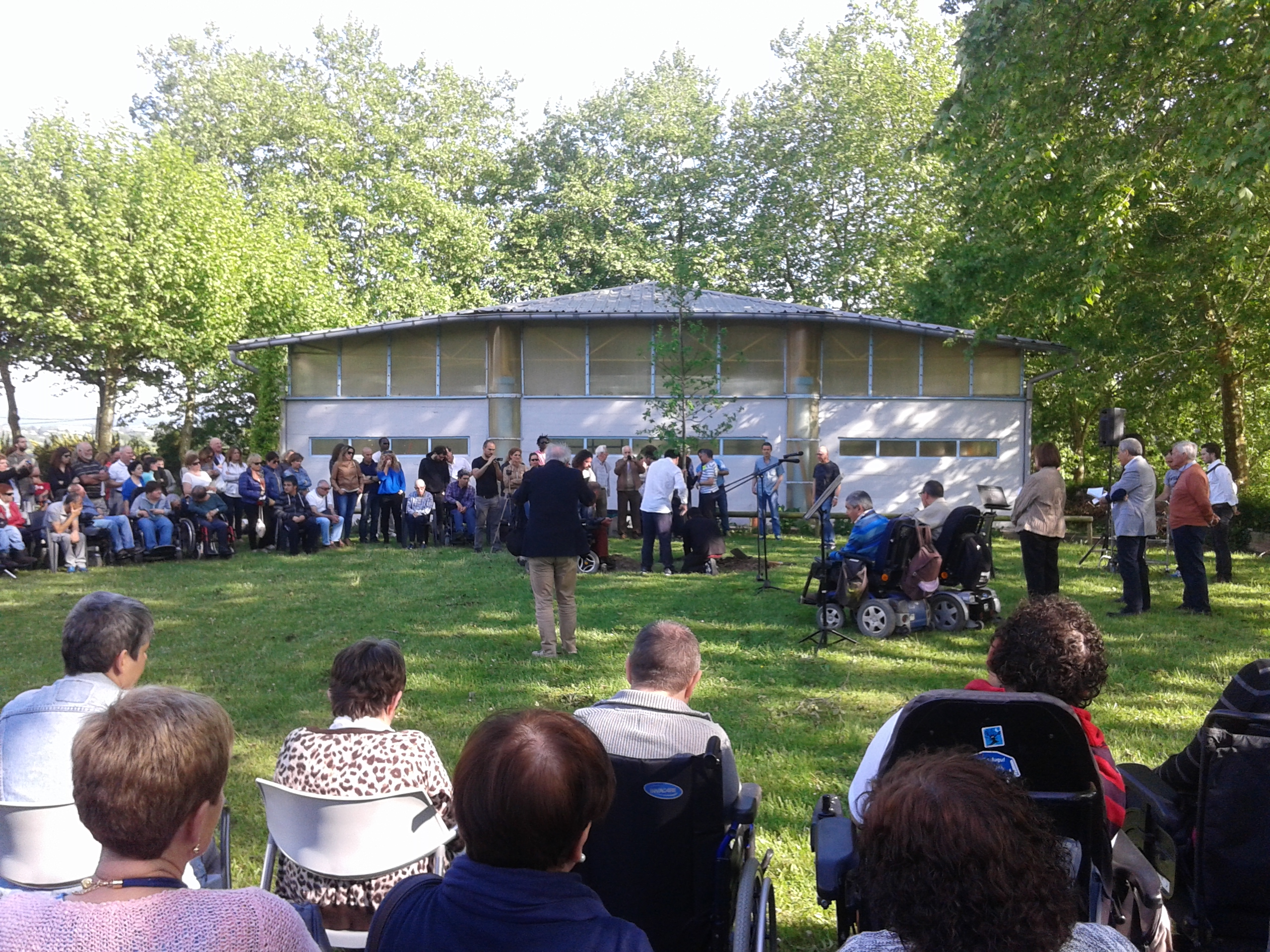 2015ean hil zen Jabier Garziari, Aspaceko sortzaile bat, Goienetxen egin zitzaion azken agurra.